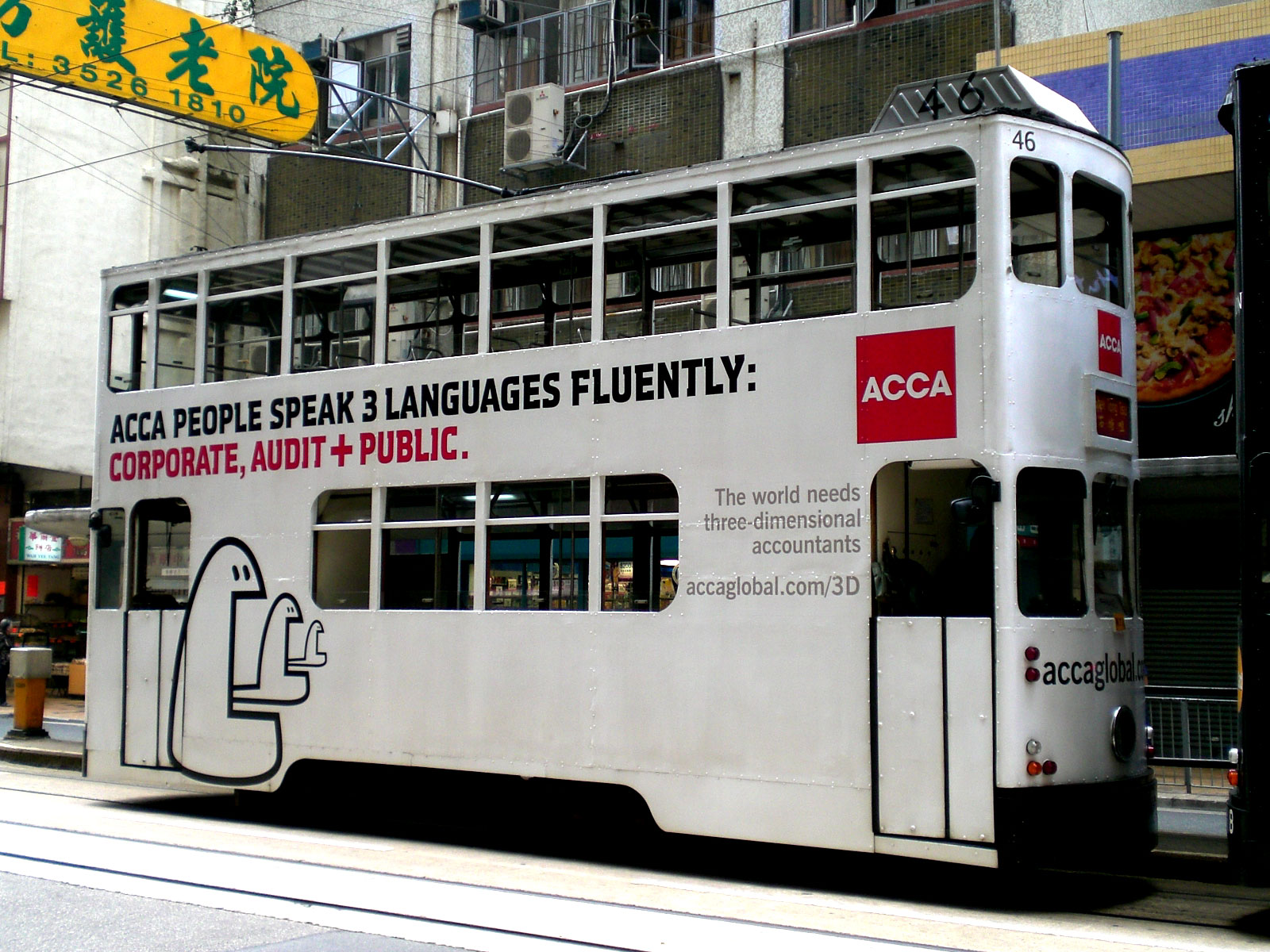 香港zh:西環德輔道西鄰近街景，香港電車車身廣告zh:特許公認會計師公會